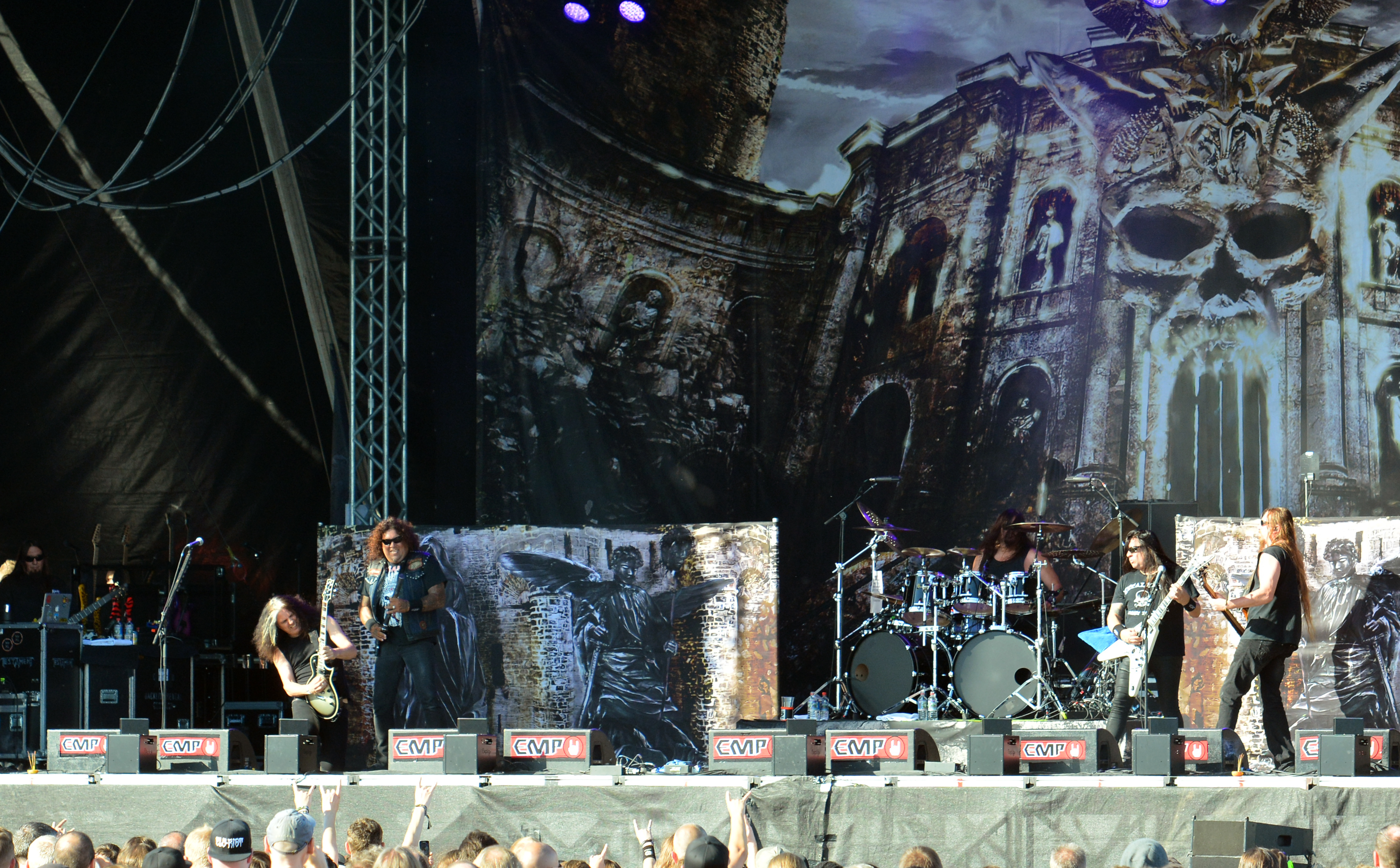 Testament beim Elbriot 2016